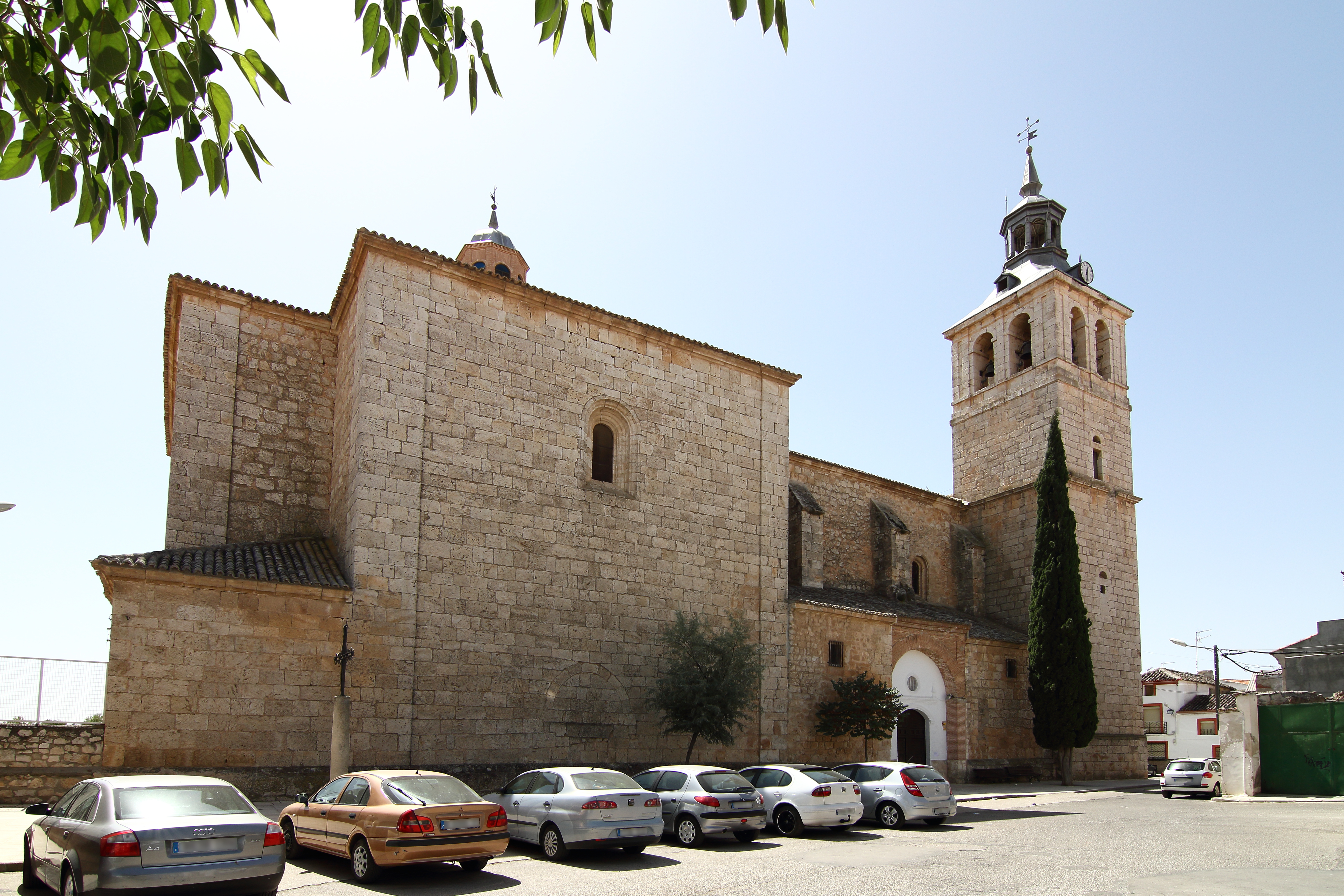 Iglesia Santo Tomas Cantuariense de Dosbarrios